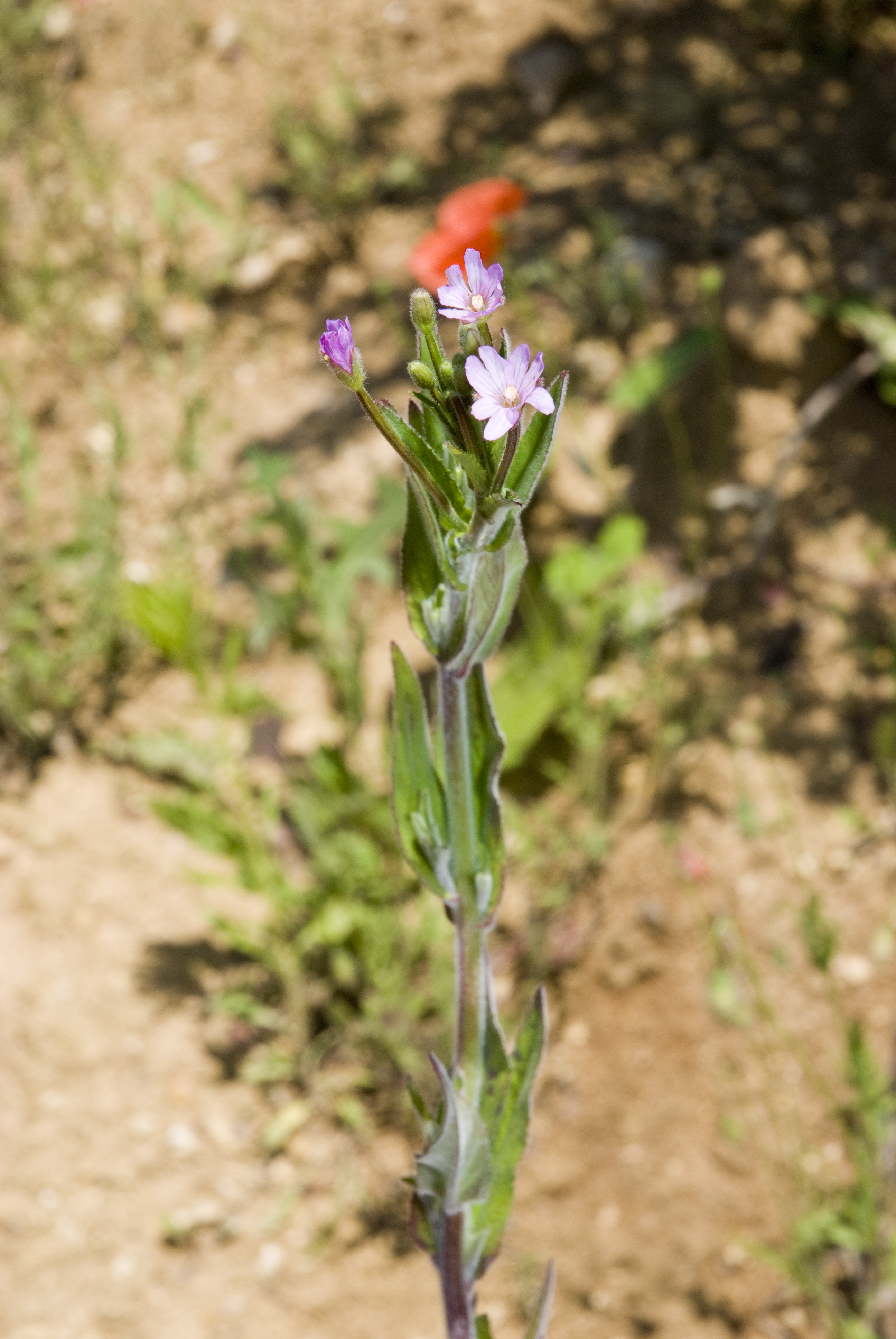 Epilobium parviflorum Carrière de Fossoy (Aisne), France